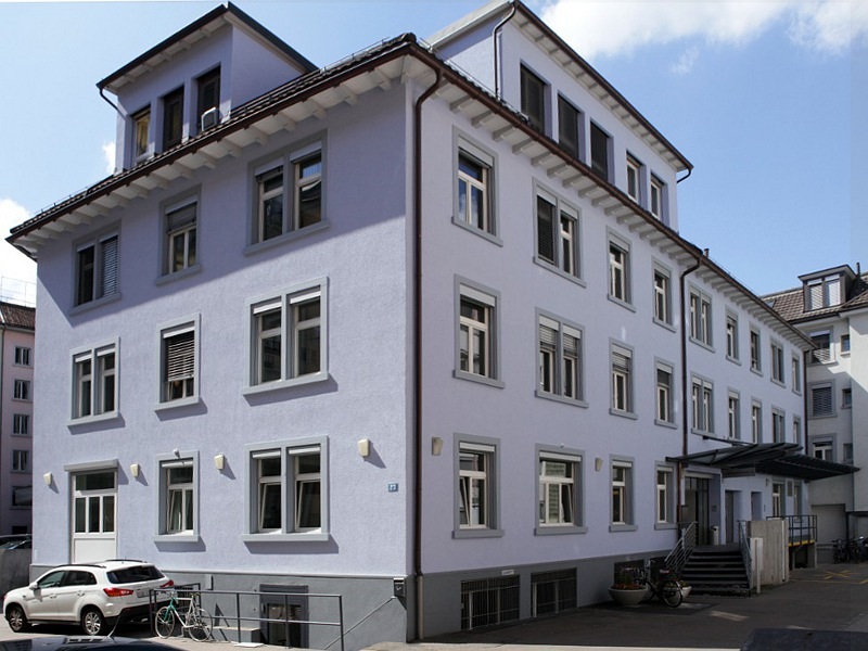 Kasernenstrasse 23 in 8021 Zürich